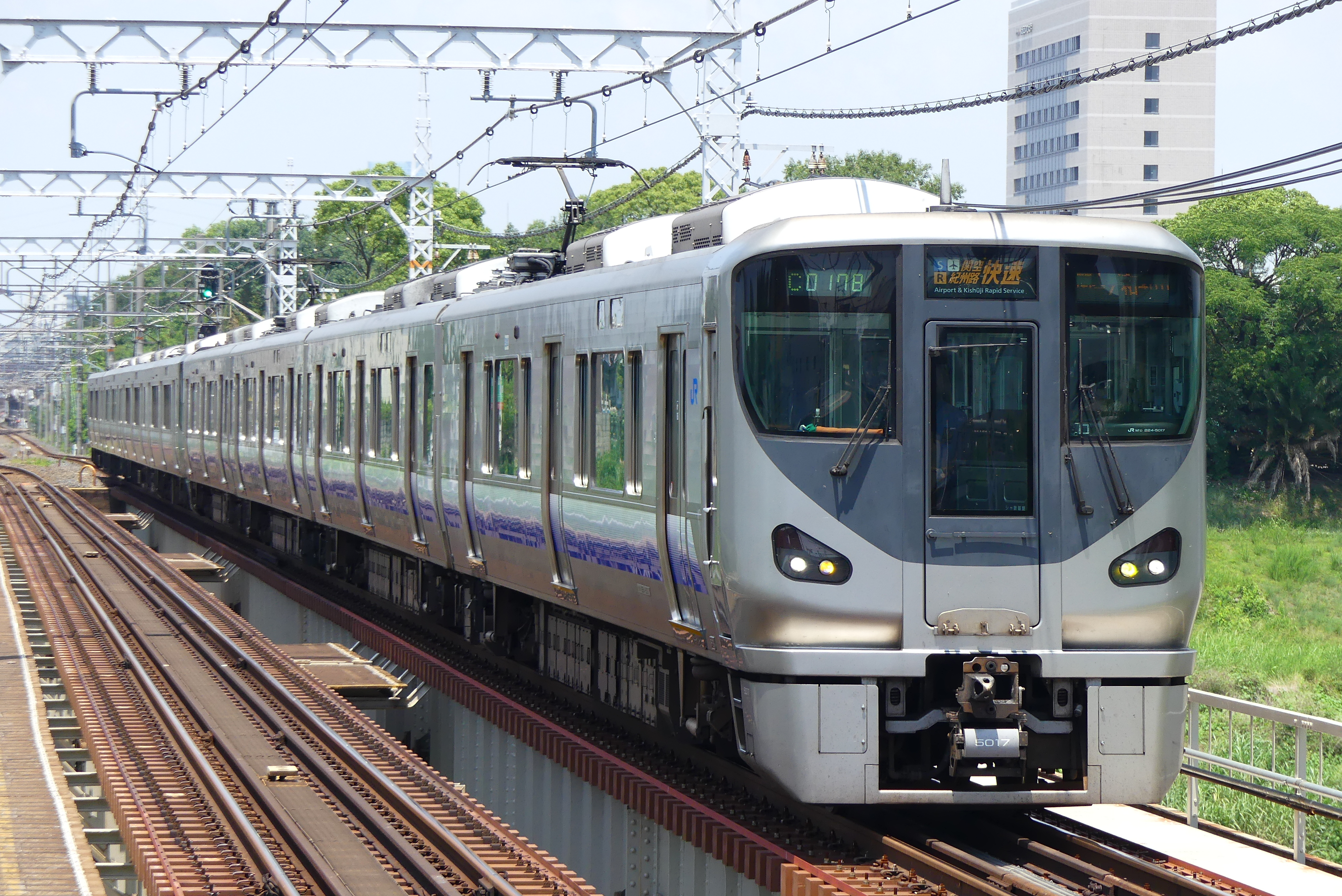 阪和線225系5000番台電車